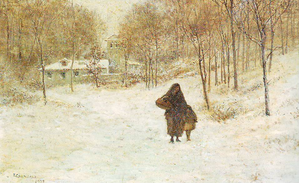 Tomás Campuzano y Aguirre (1857-1934): paisajista santanderino (Cantabria, España) que veraneaba en el pueblo de Becerril de la Sierra (Madrid), dejó una buena colección de obras dedicadas a su entorno, además de otras vistas generales de la Sierra de Guadarrama. Bibliografía: Tomás Campuzano y Aguirre. Fundación Marcelino Botín. Santander, 2000. isbn 978-84-95516--17-9